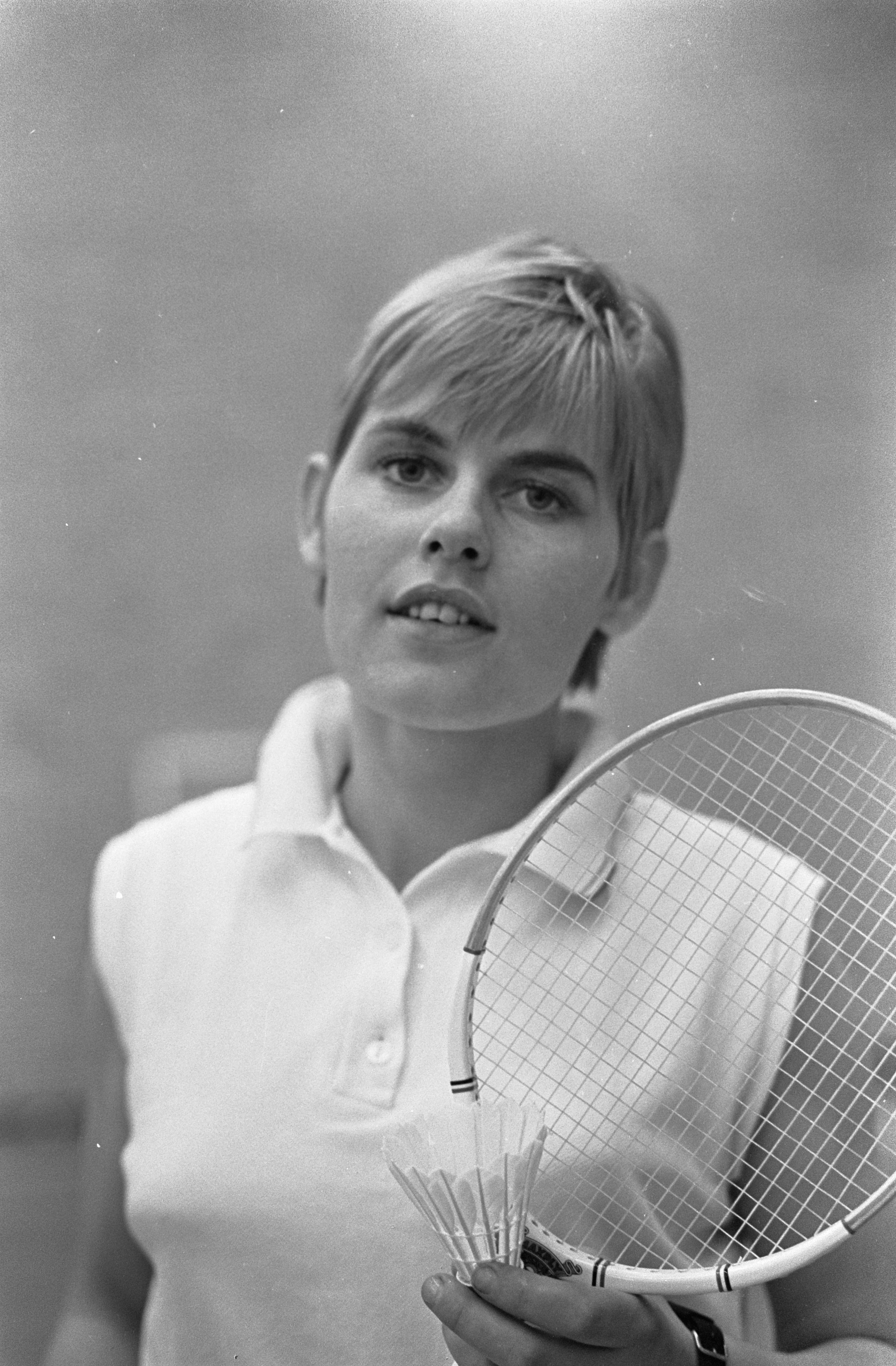 Collectie / Archief : Fotocollectie Anefo Reportage / Serie : [ onbekend ] Beschrijving : Nederlandse kampioenschappen Badminton Schiedam. Agnes Geene Datum : 31 maart 1968 Locatie : Schiedam, Zuid-Holland Trefwoorden : BADMINTON, KAMPIOENSCHAPPEN Persoonsnaam : Geene, Agnes Fotograaf : Kroon, Ron / Anefo Auteursrechthebbende : Nationaal Archief Materiaalsoort : Negatief (zwart/wit) Nummer archiefinventaris : bekijk toegang 2.24.01.05 Bestanddeelnummer : 921-2095